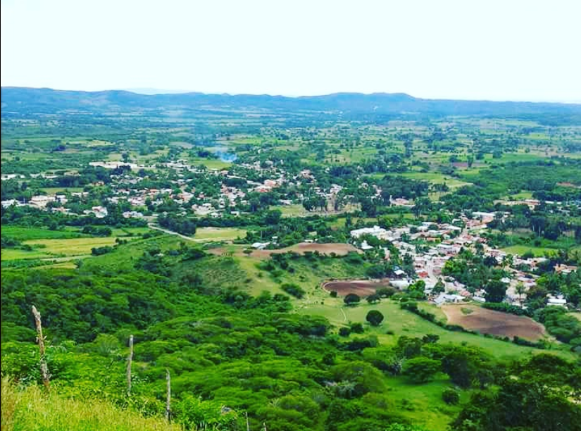 Imagen de Tábara Arriba desde el alto de una montaña